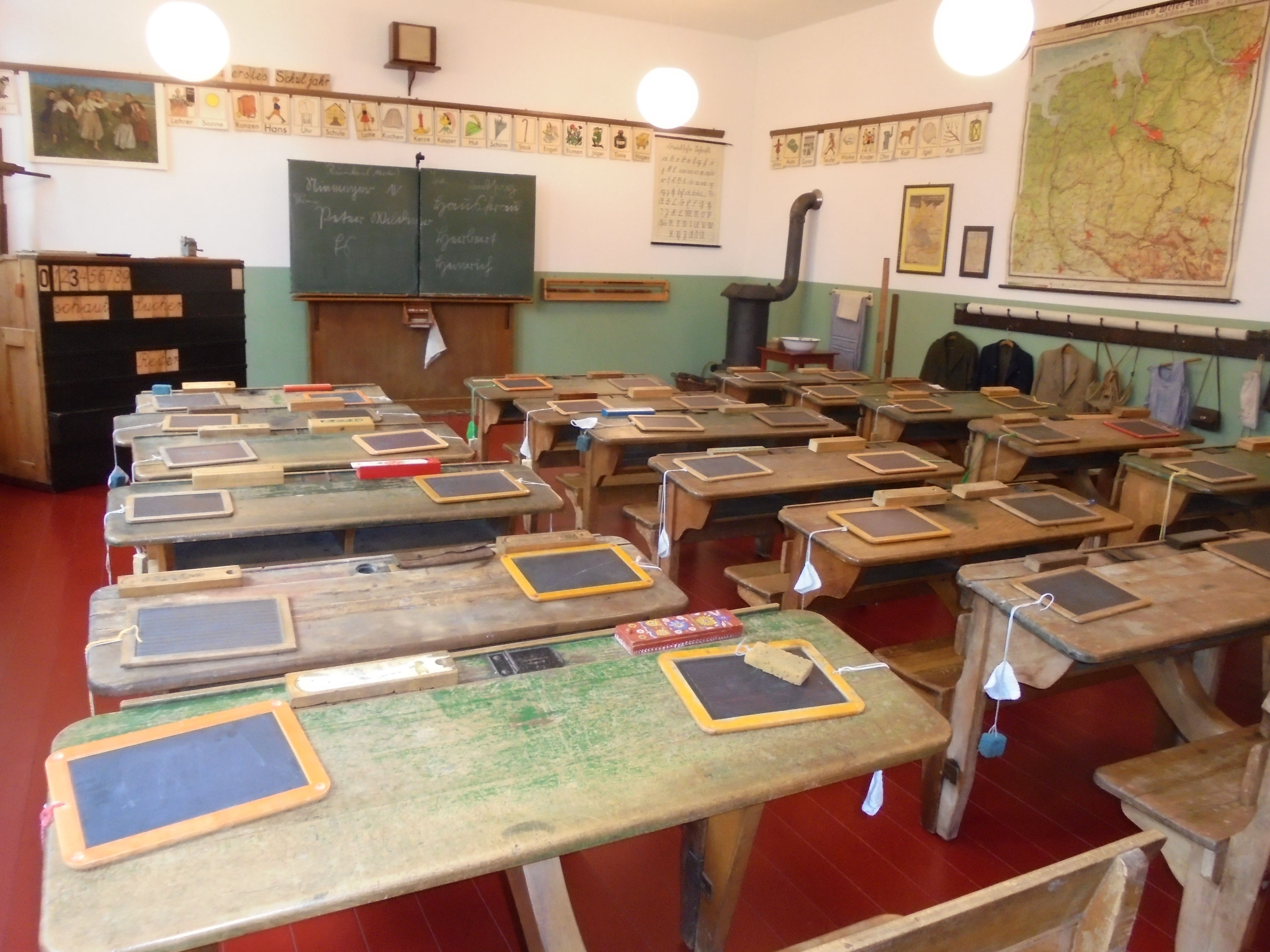 Schoolmuseum - Kirchgasse - Schüttorf - Landkreis Grafschaft Bentheim - Nedersaksen - Duitsland